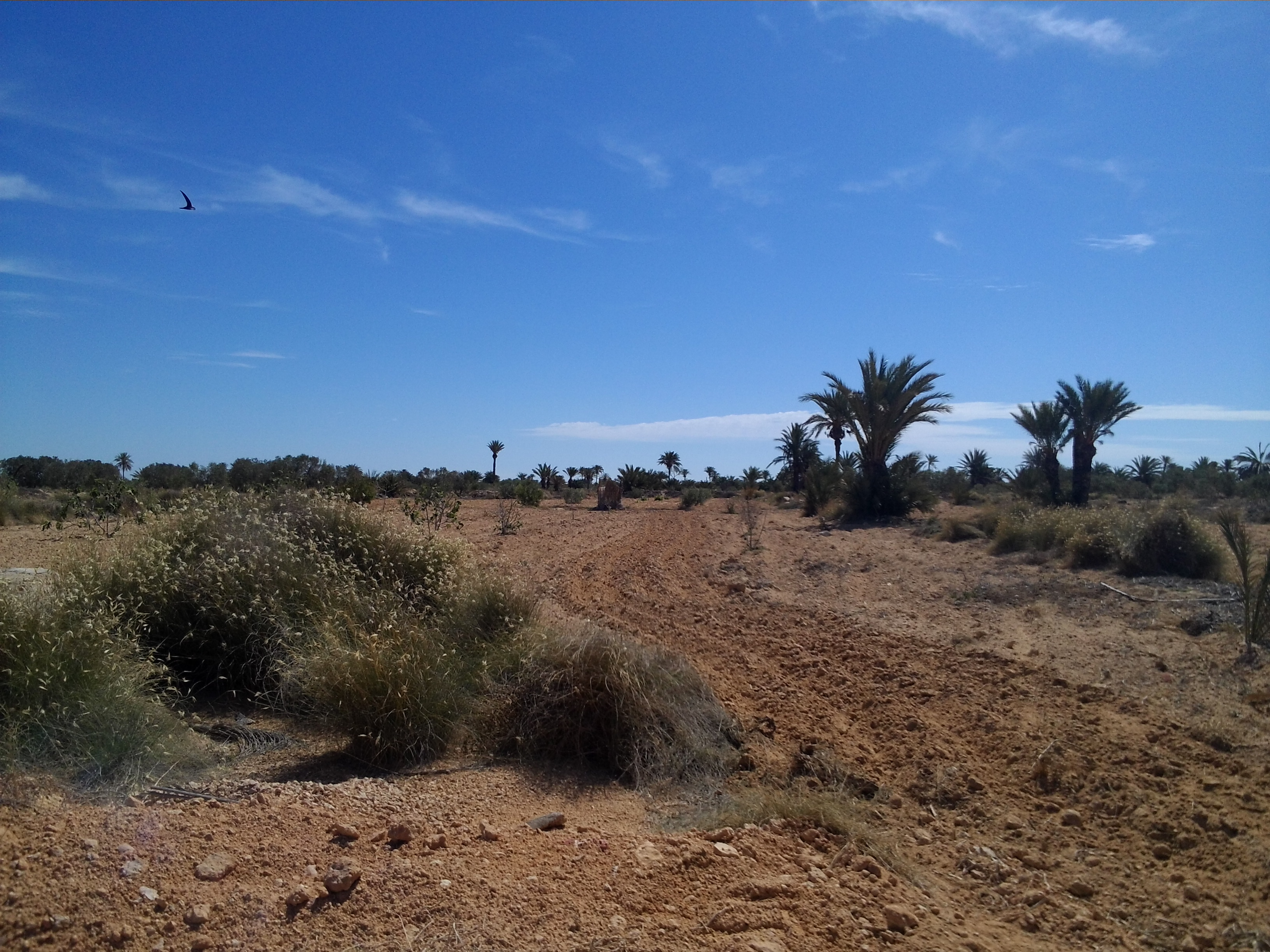 Сільськогосподарські угіддя на острові Гарбі